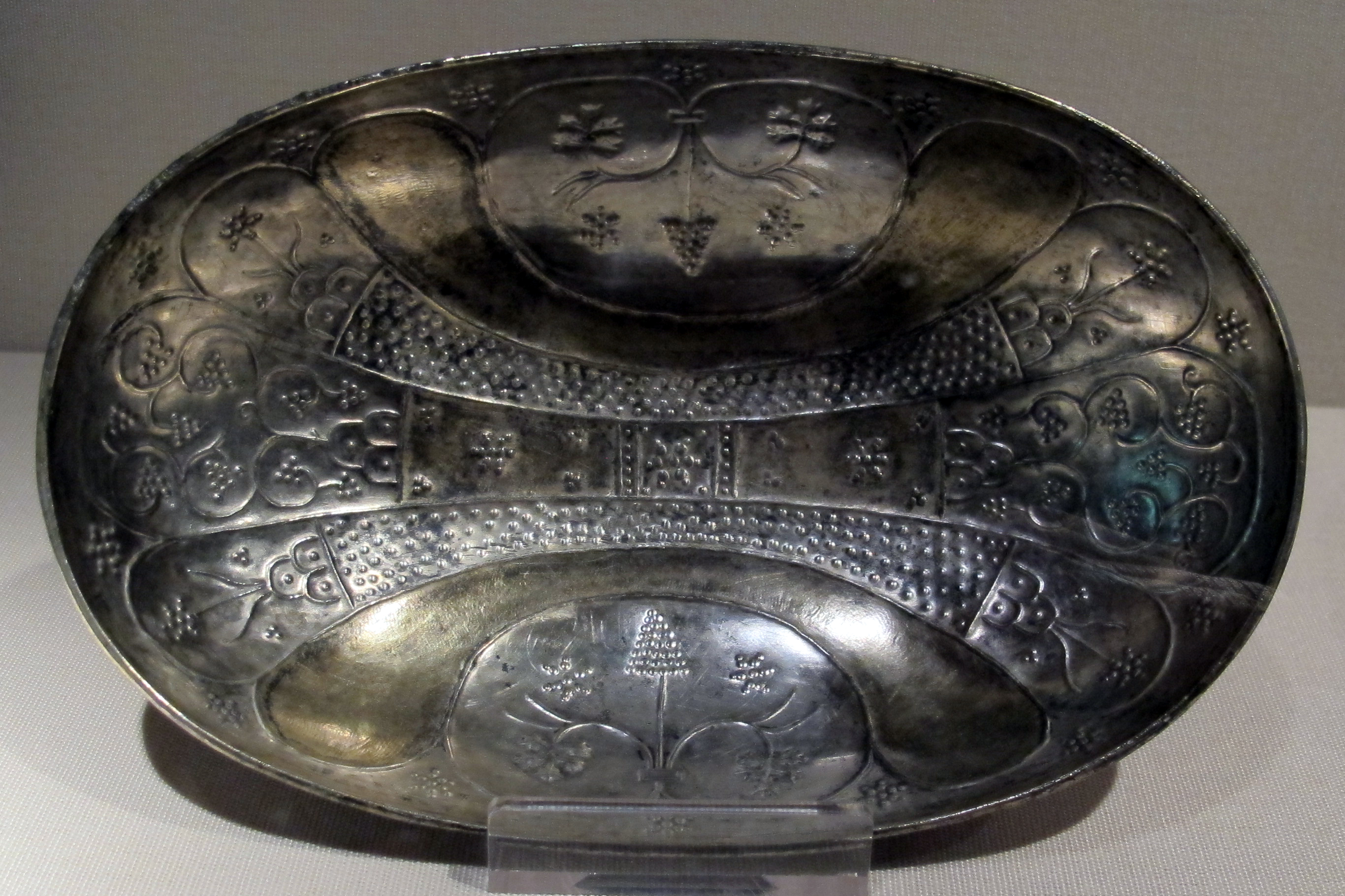 Iran sasanide, coppa ovale in argento con sogg. vegetali e geometrici, VII sec